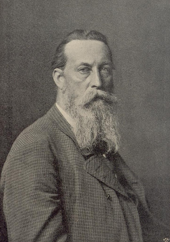 Reinhold Begas. Aufnahme von Löscher & Petsch-Berlin, c. 1900